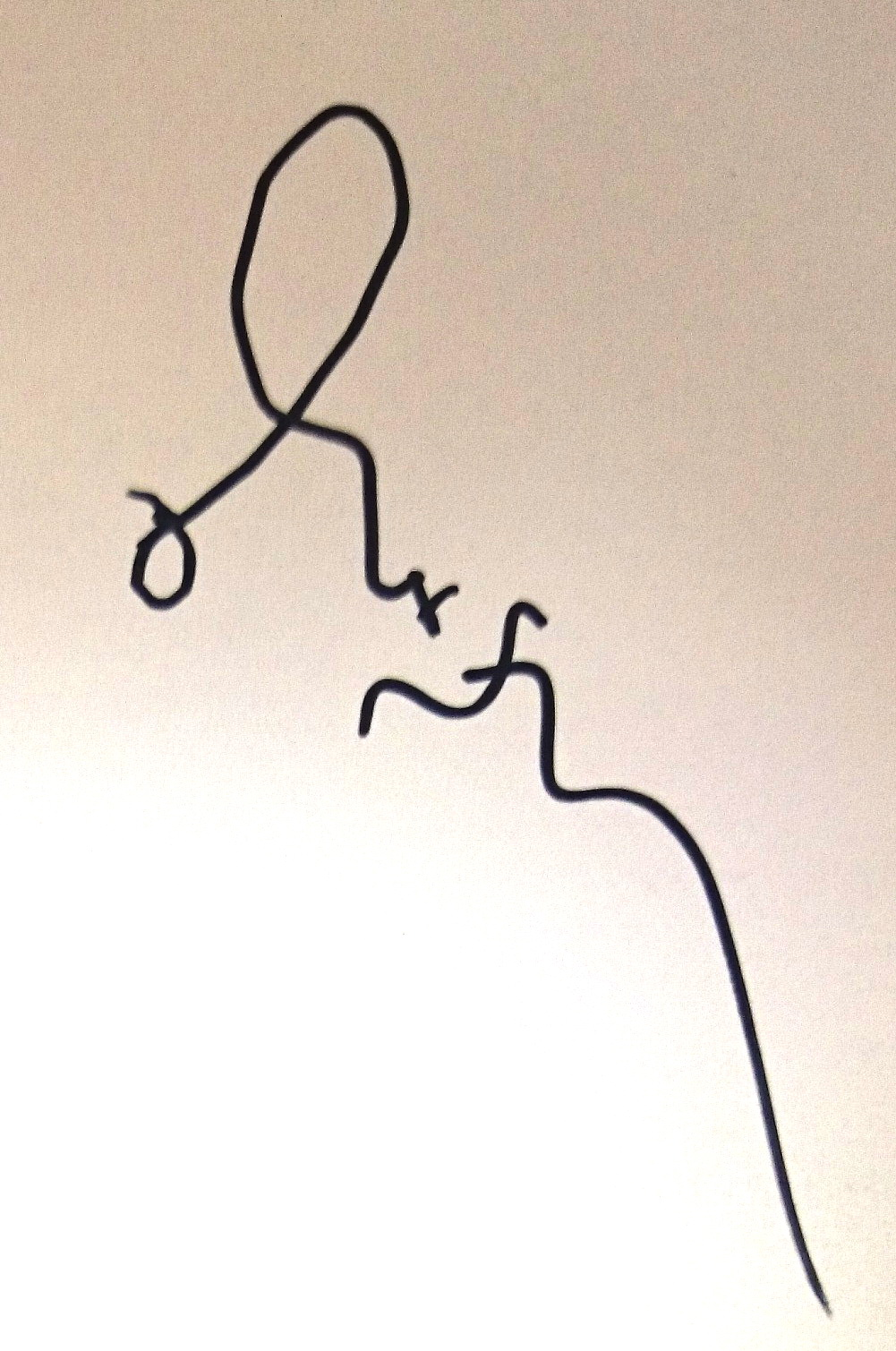 日本藝人滿島光簽名